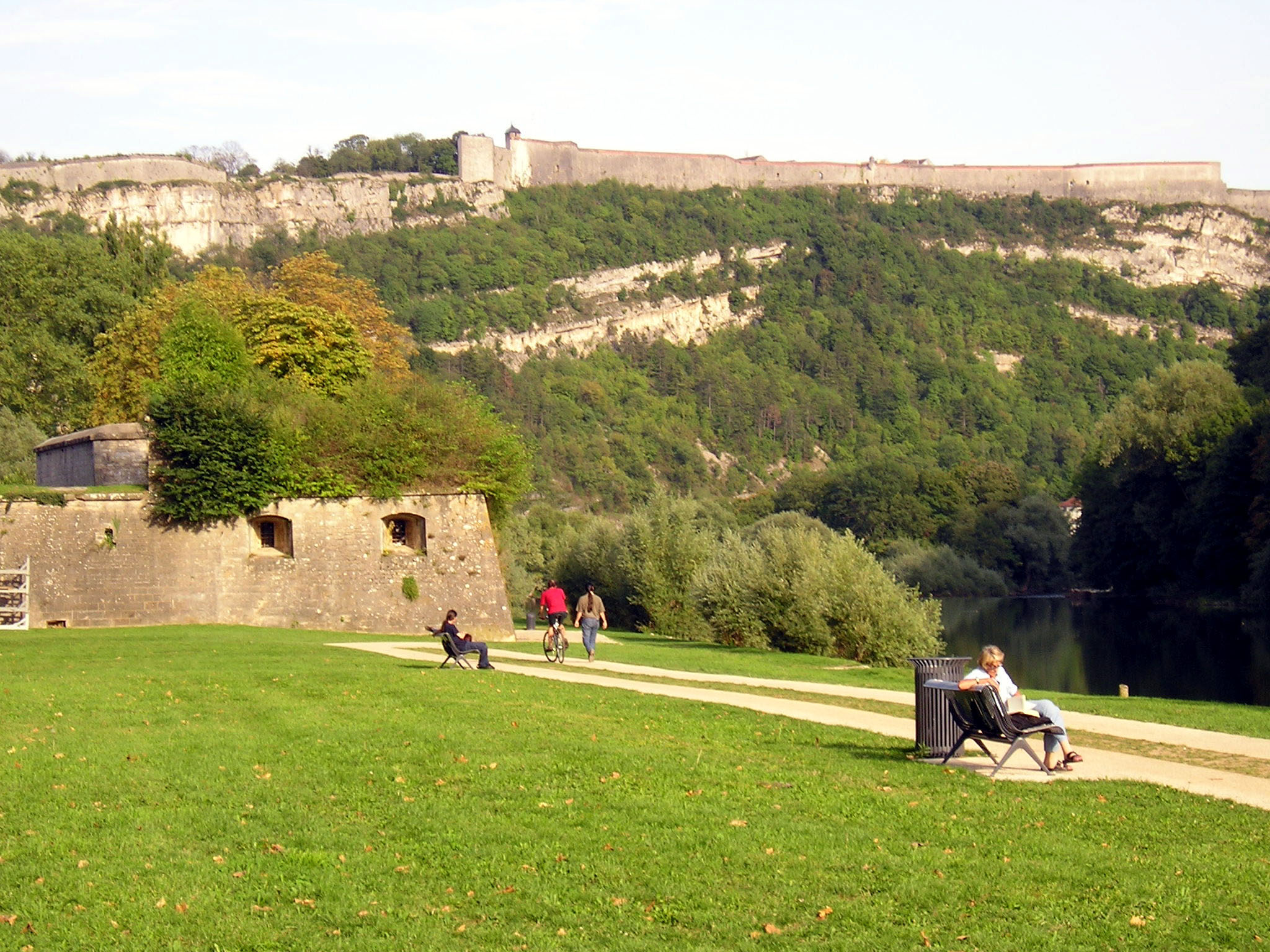 parc de la Gare d'Eau de Besançon